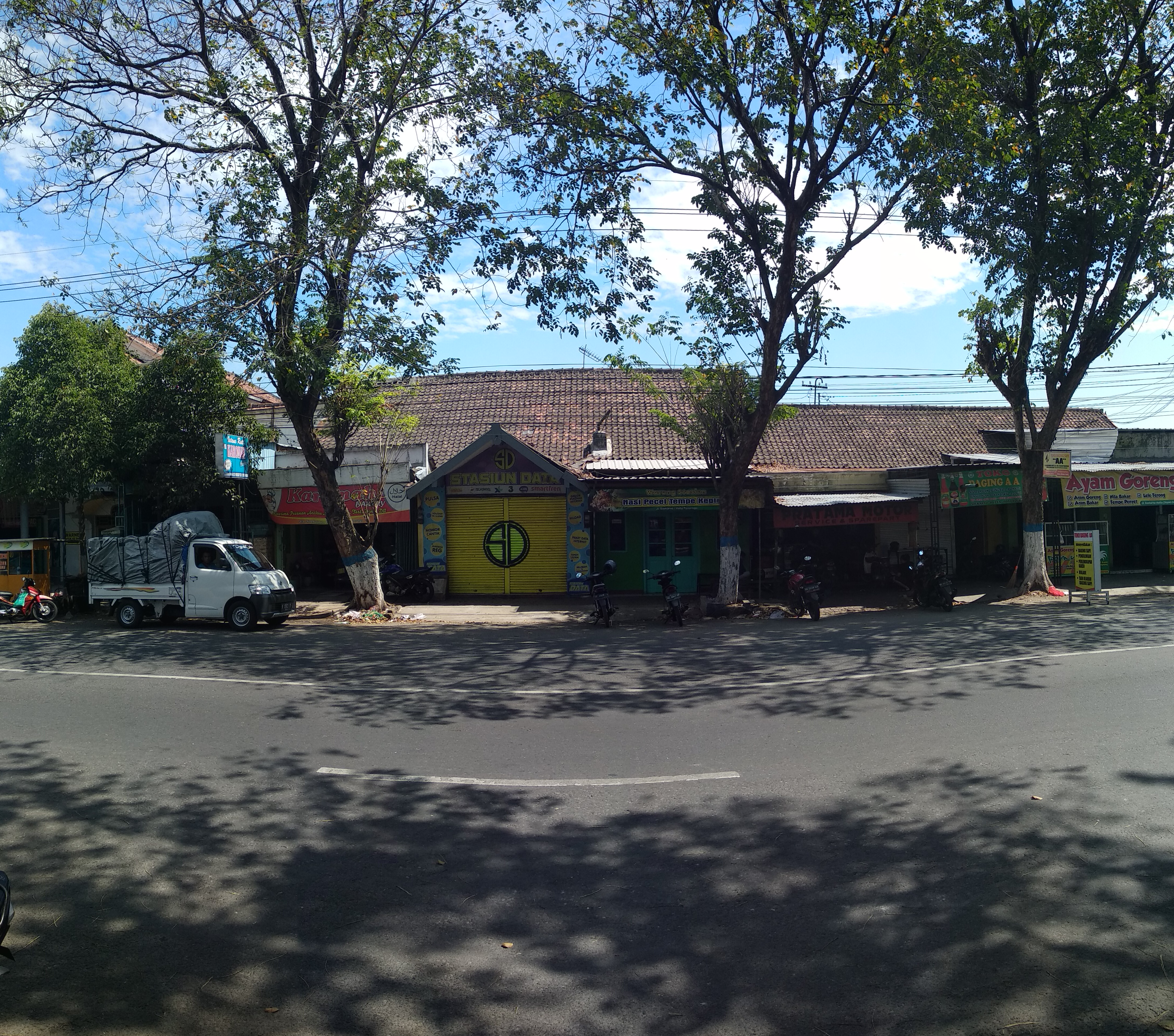 Tampak depan Stasiun Ponorogo yang kini telah nonaktif